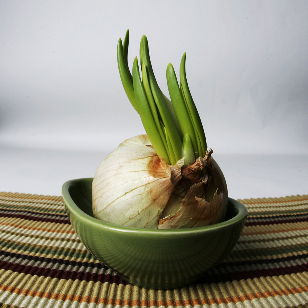 Allium cepa growing.